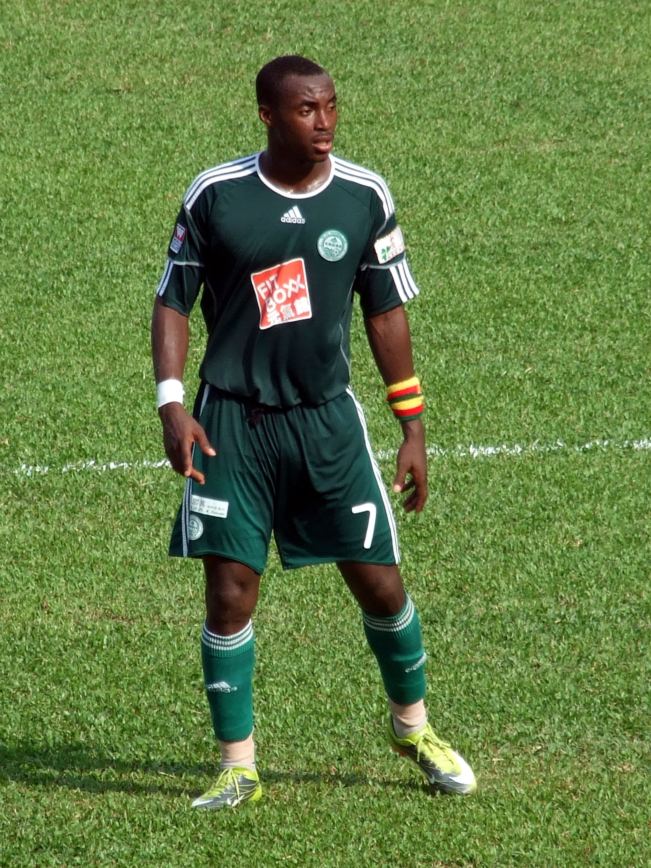 中文（香港）: 佳爾·祖利亞·歷基·安杜 - 大埔 VS 晨曦